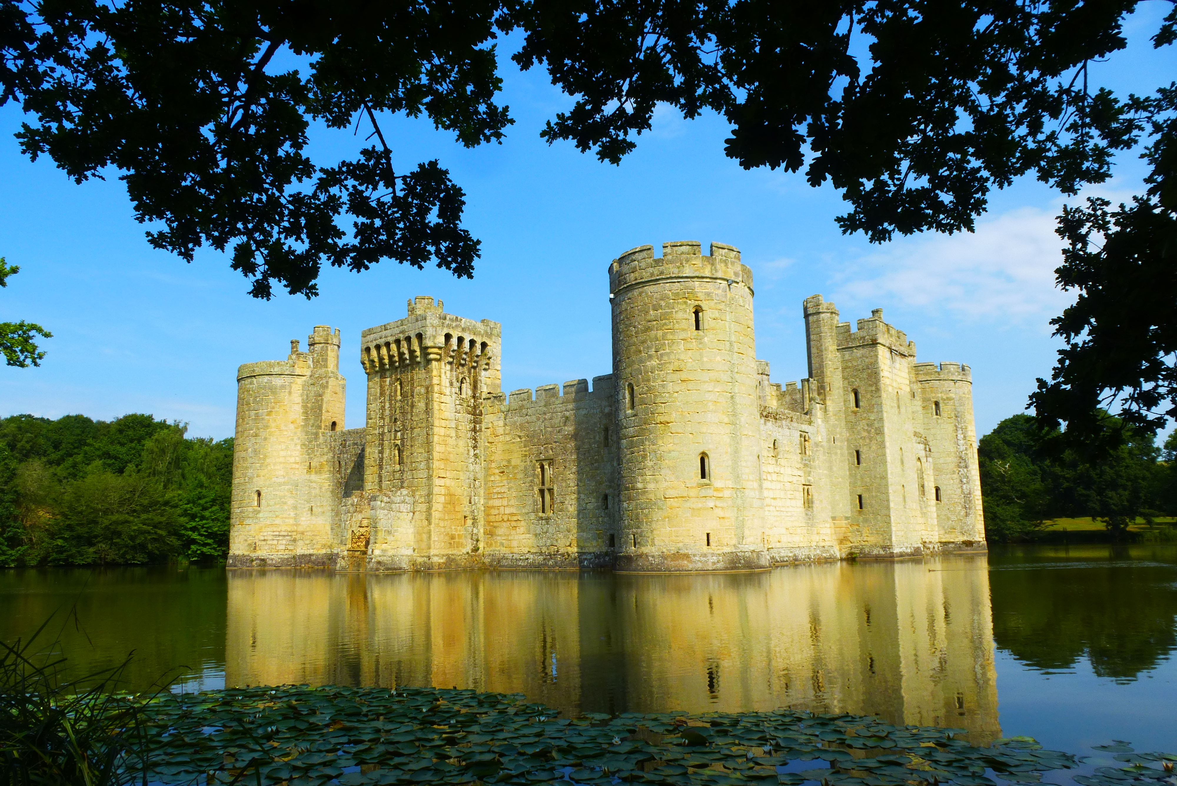 Mittelalterliches Wasserschloss von 1385